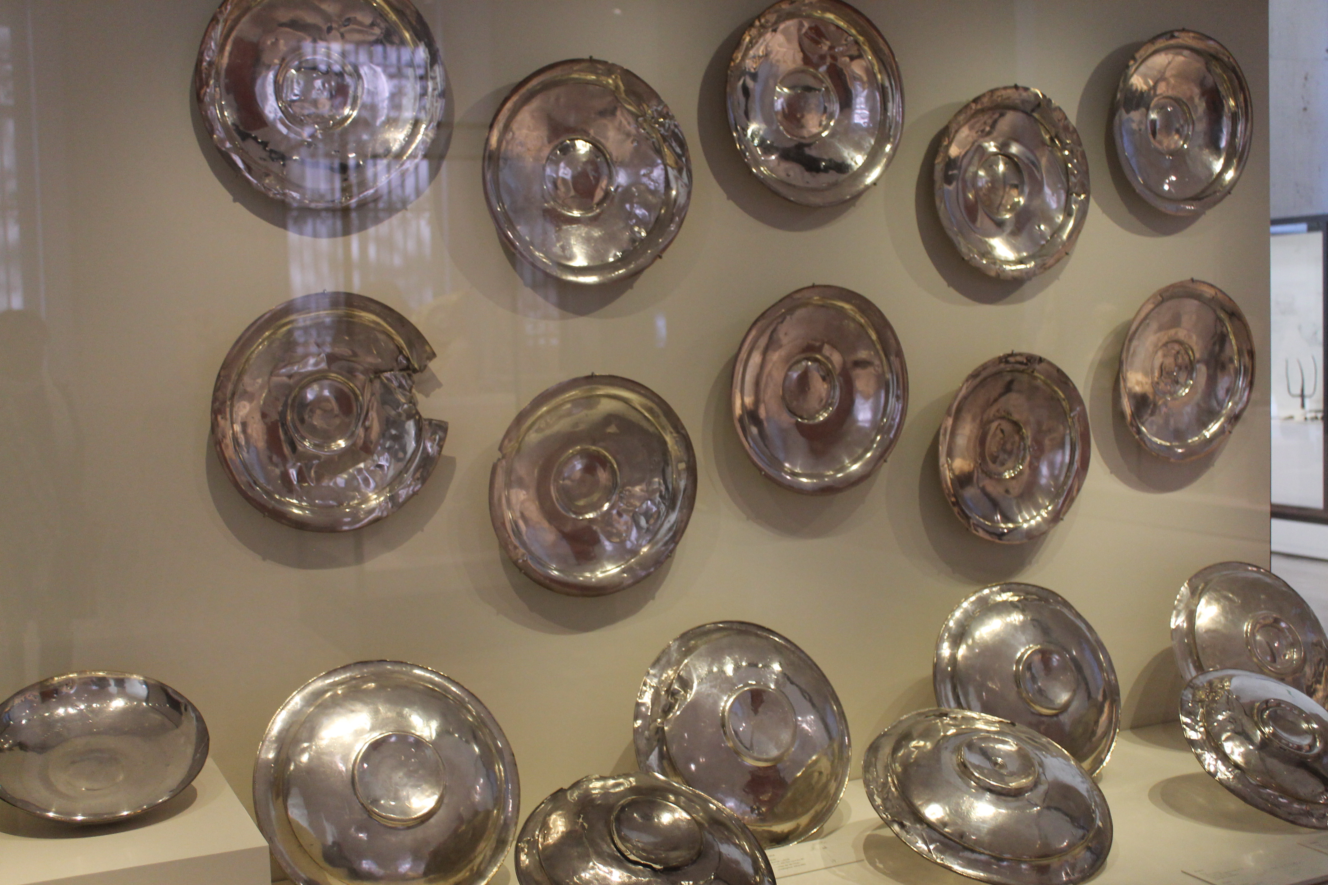 Tesoro de Abengibre en el Museo Arqueológico Nacional de España.